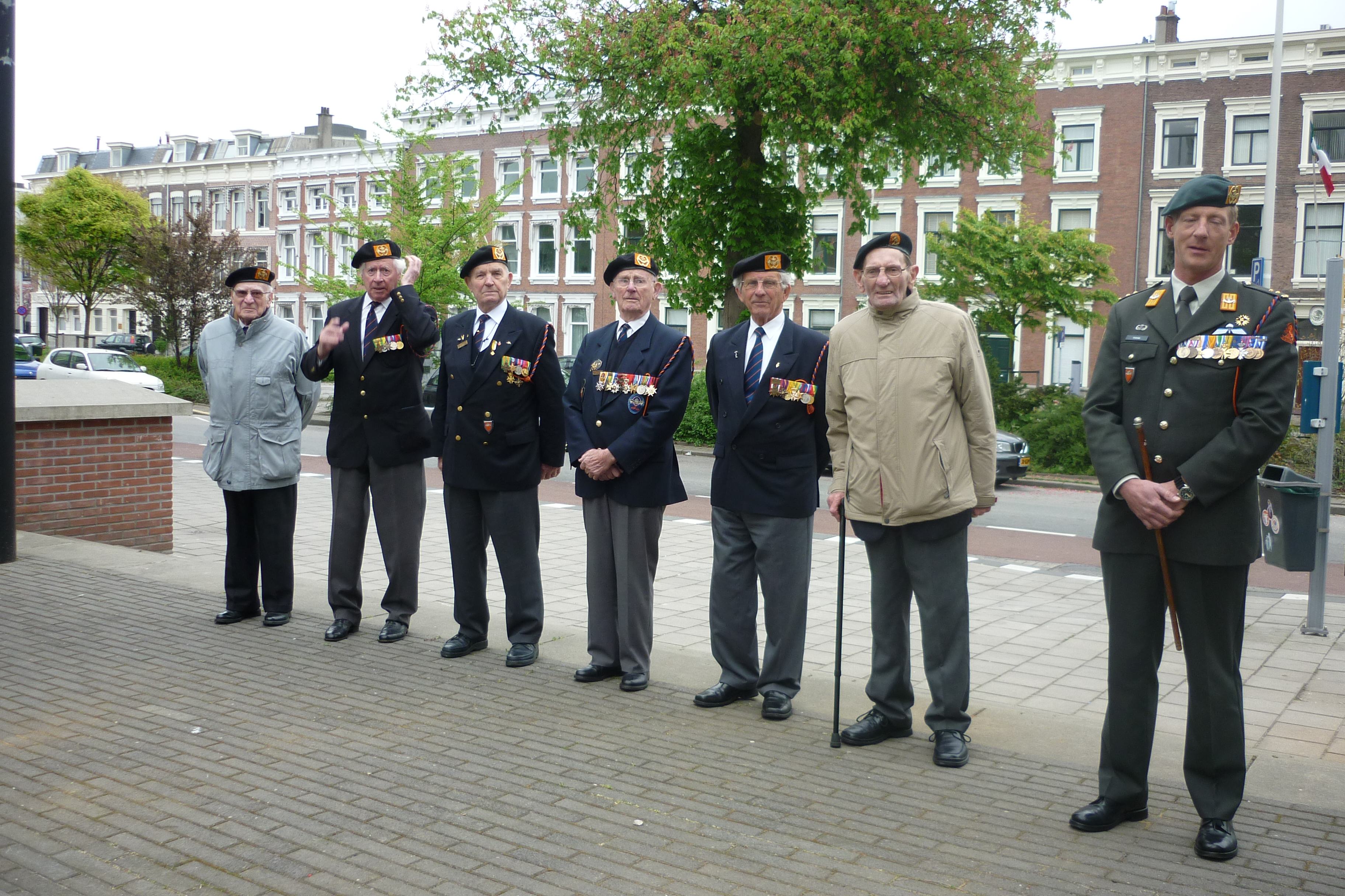 Veteranen van de Prinses Irene Brigade